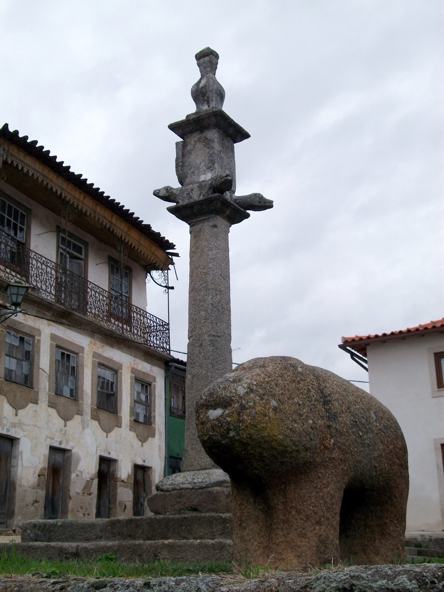 Pelourinho e Berroa de Torre de Dona Chama, Mirandela, Portugal.